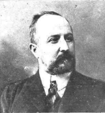 Ángel Galarza Vidal.